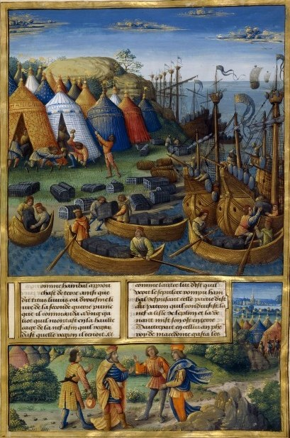 Romuleon-BnF366-fol. 114 Scipion l'Africain et Hannibal